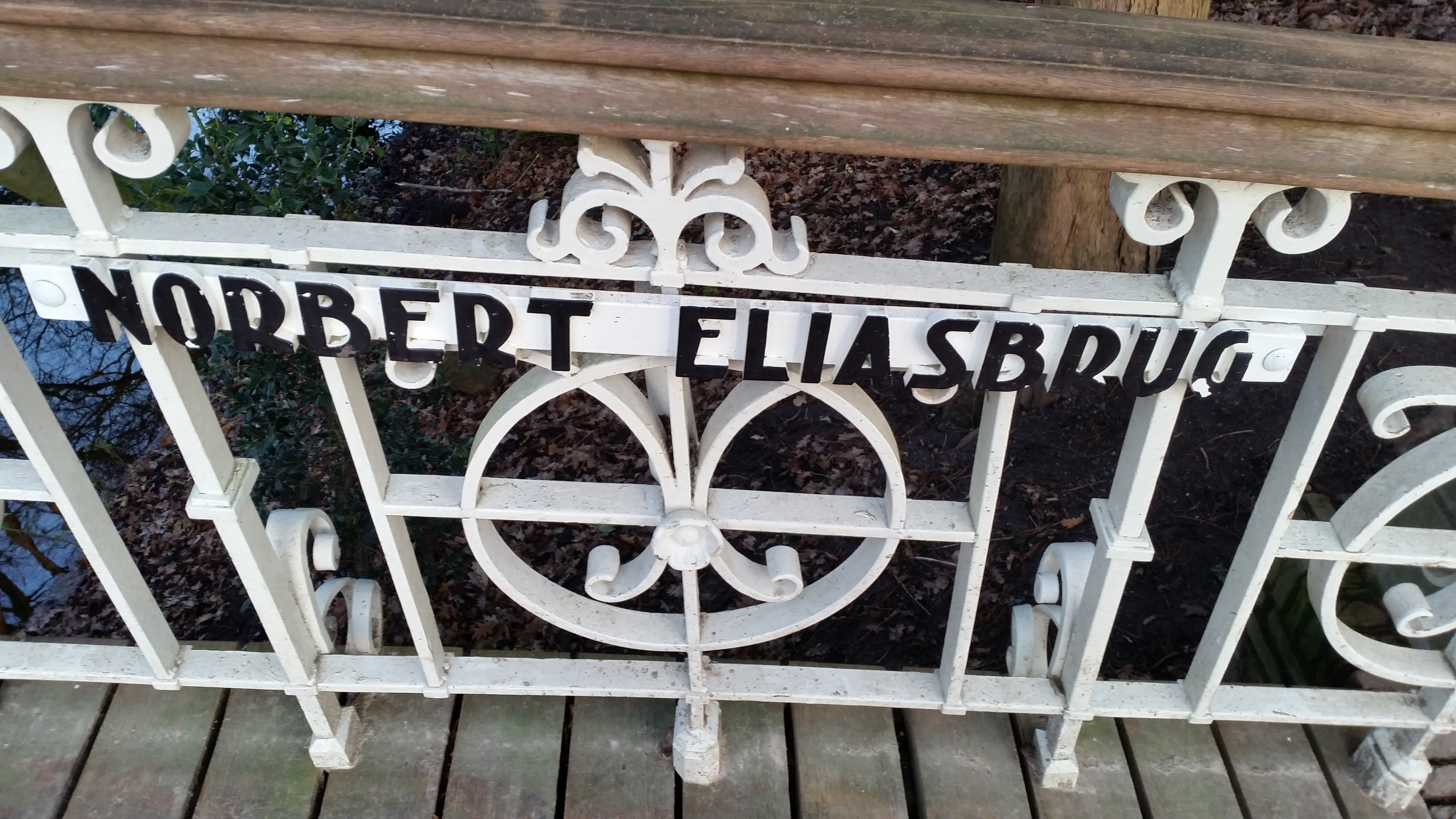 Naamplaat van Brug 453, Norbert Eliasbrug